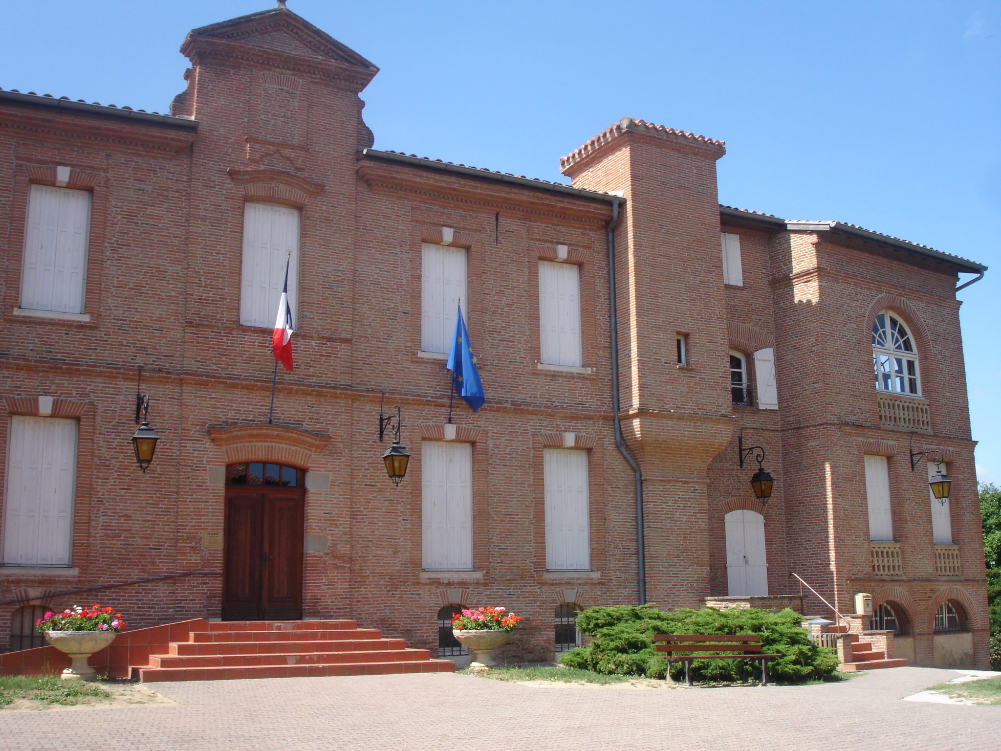 France, Haute-Garonne (31), Montesquieu-Lauragais, mairie